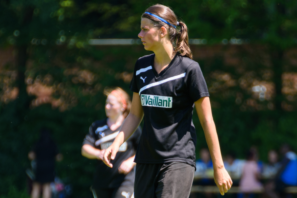 Julia Dietsch im Juli 2018 in einem Testspiel gegen den FC Bergheim